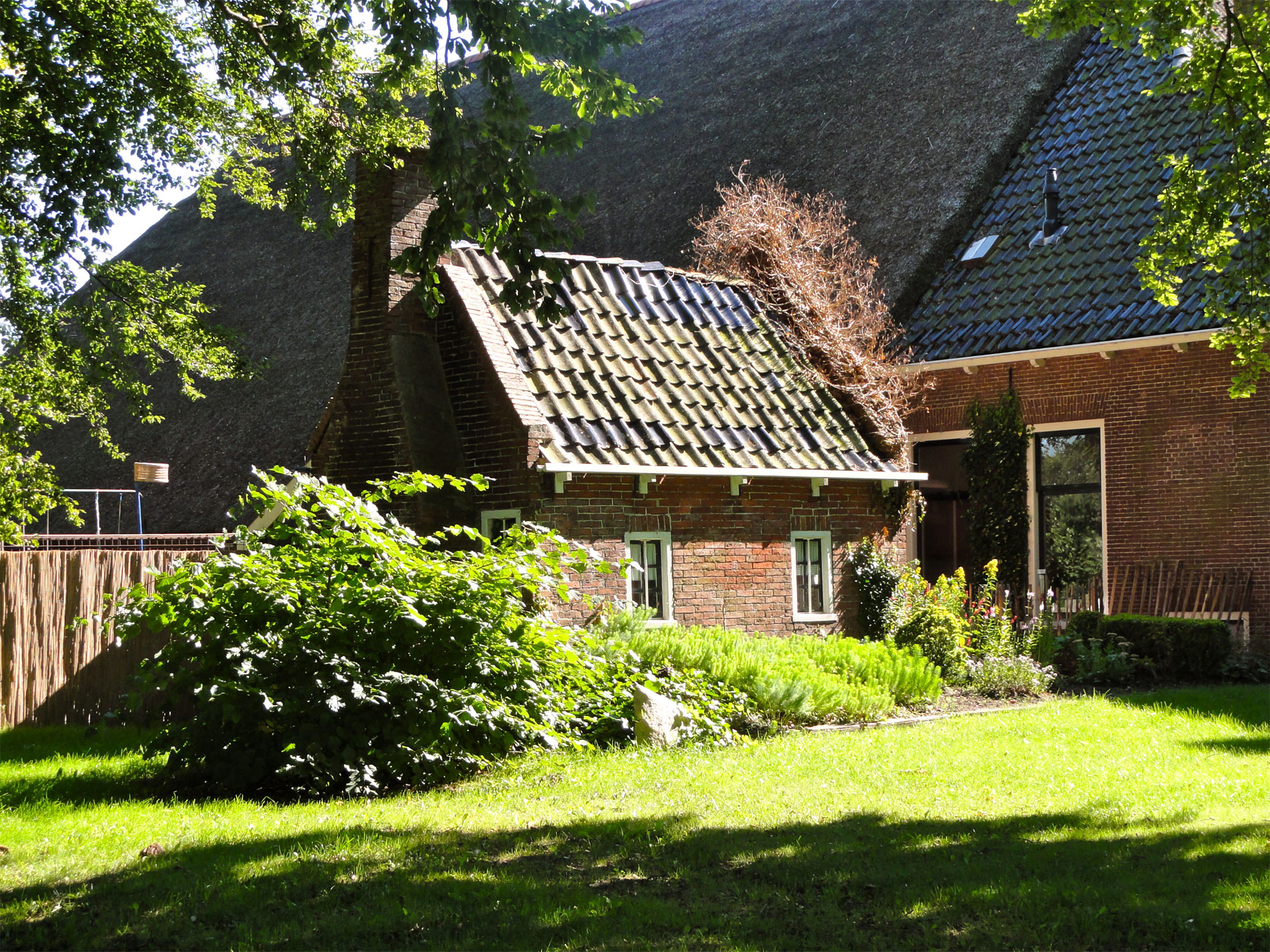 Stookhok van een boerderij aan de Boerestreek 6 It Heechsan